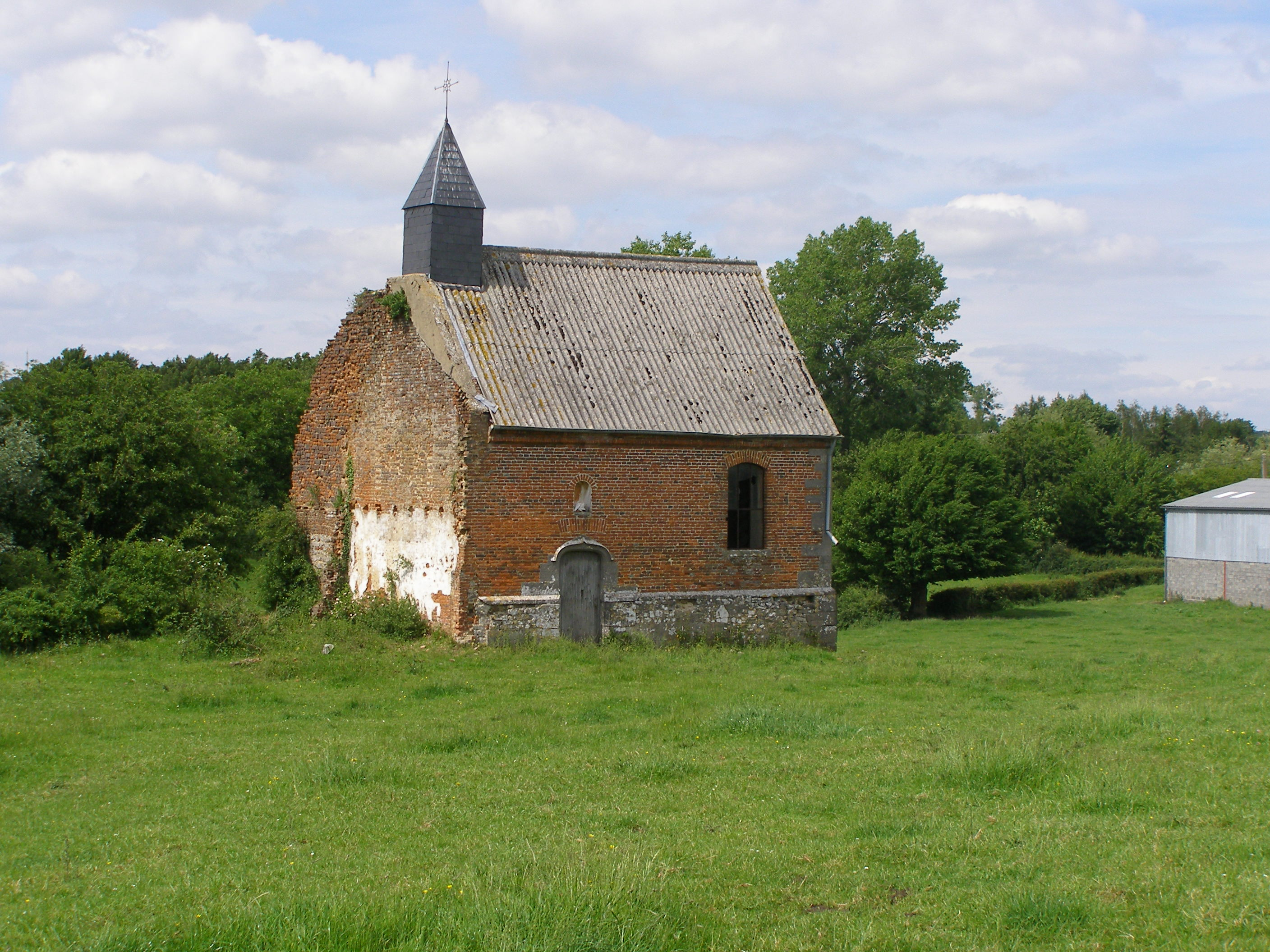 Chapelle Saint Julien.